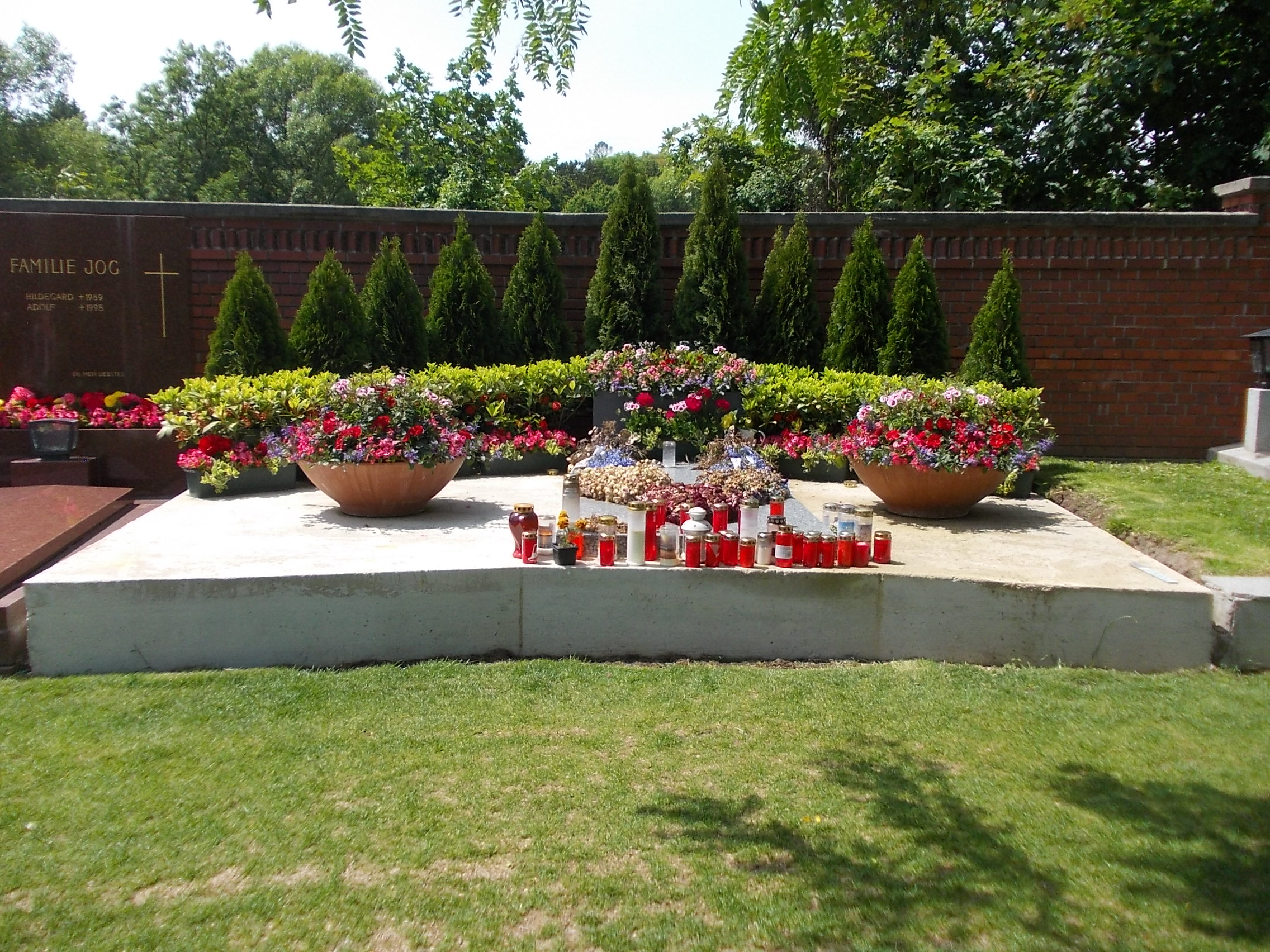 Grab Niki Lauda-Heiligenstädter Friedhof